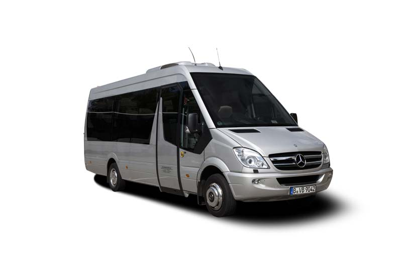 Mercedes Sprinter - Beispiel für einen BVB Bus mit 7-15 Sitzplätzen